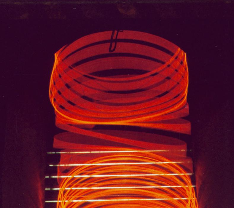 caida de espiras